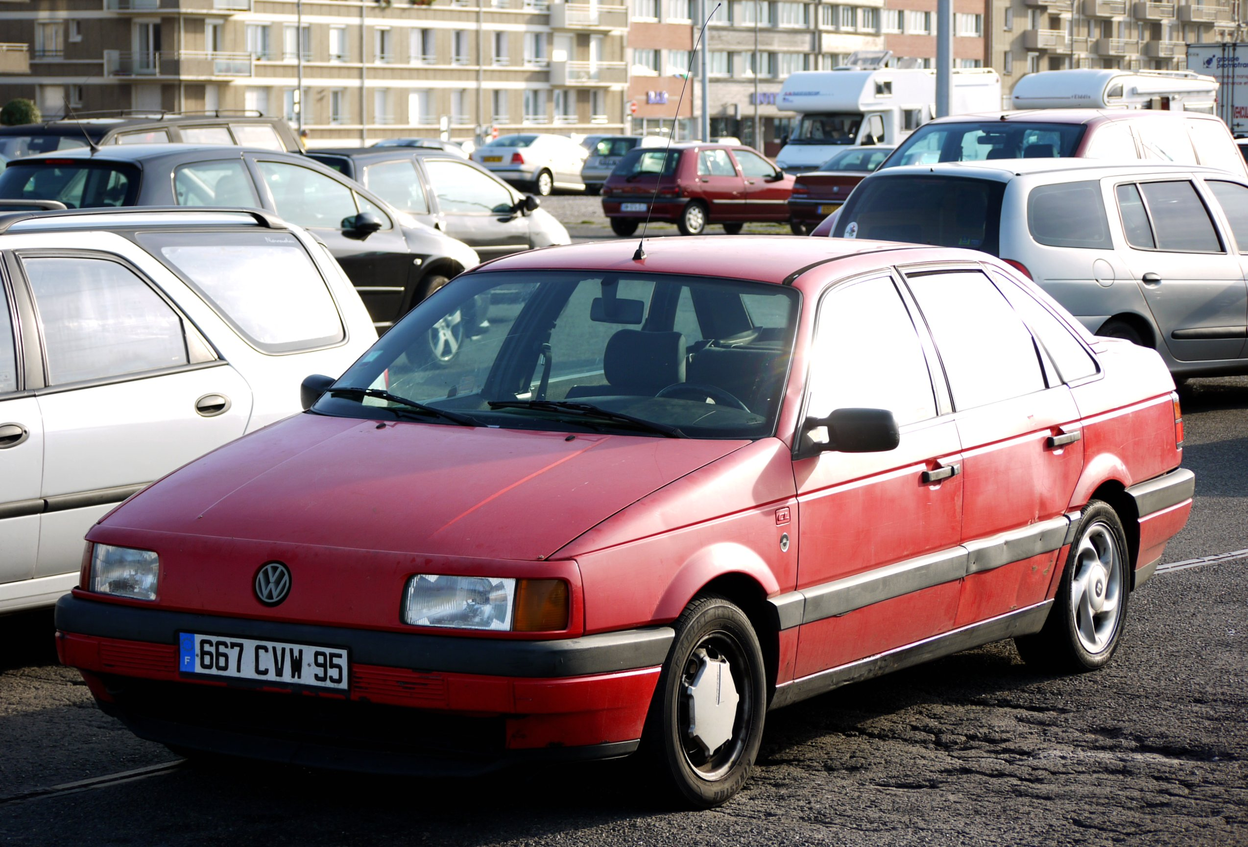 Volkswagen Passat Mk3 CL saloon.